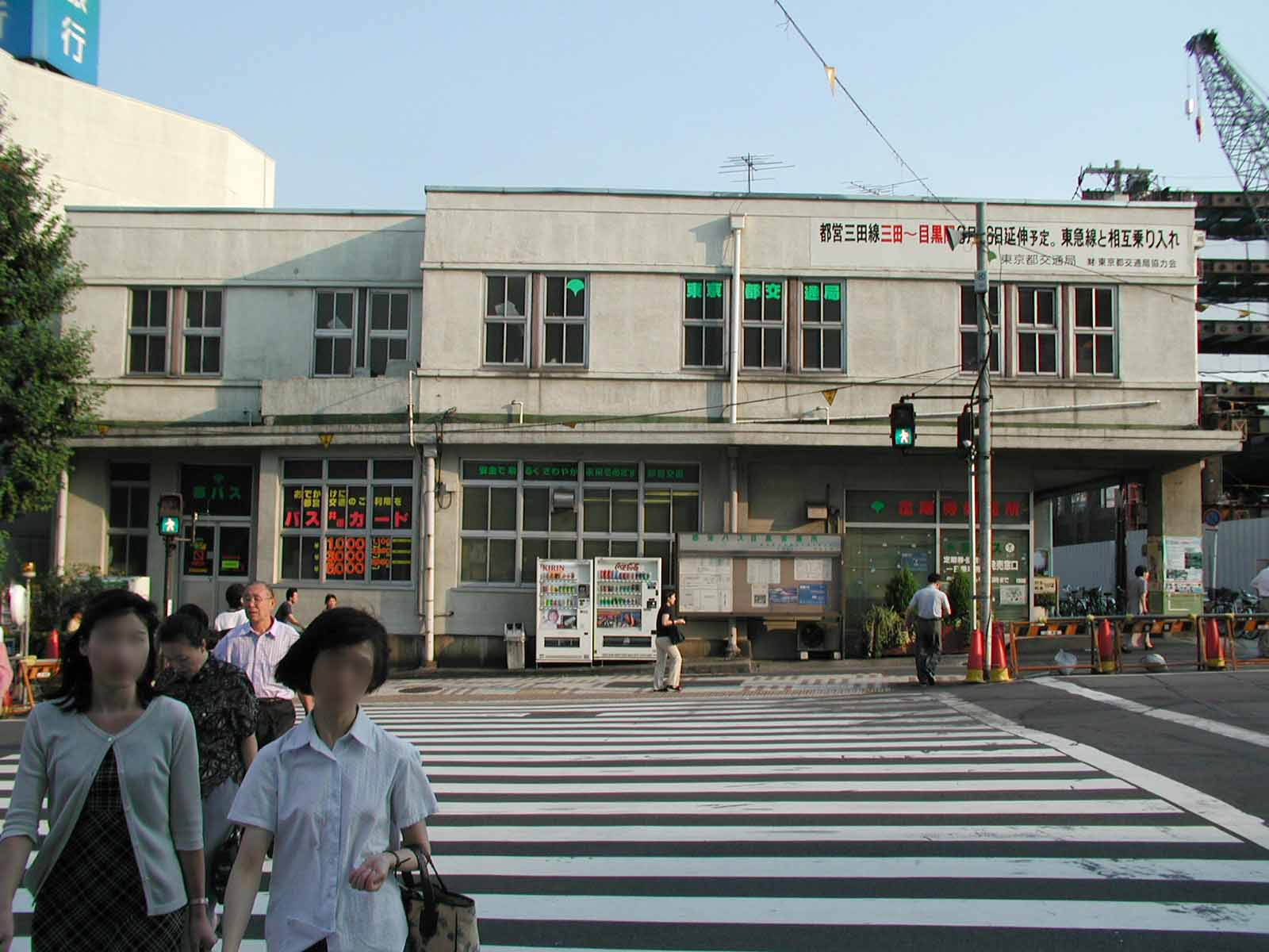 在りし日の都営バス目黒営業所事務所棟。2000年に支所降格、分駐所を経て2005年に閉鎖された。跡地は再開発され、高層マンション「ブリリアタワーズ目黒」などが建っている。